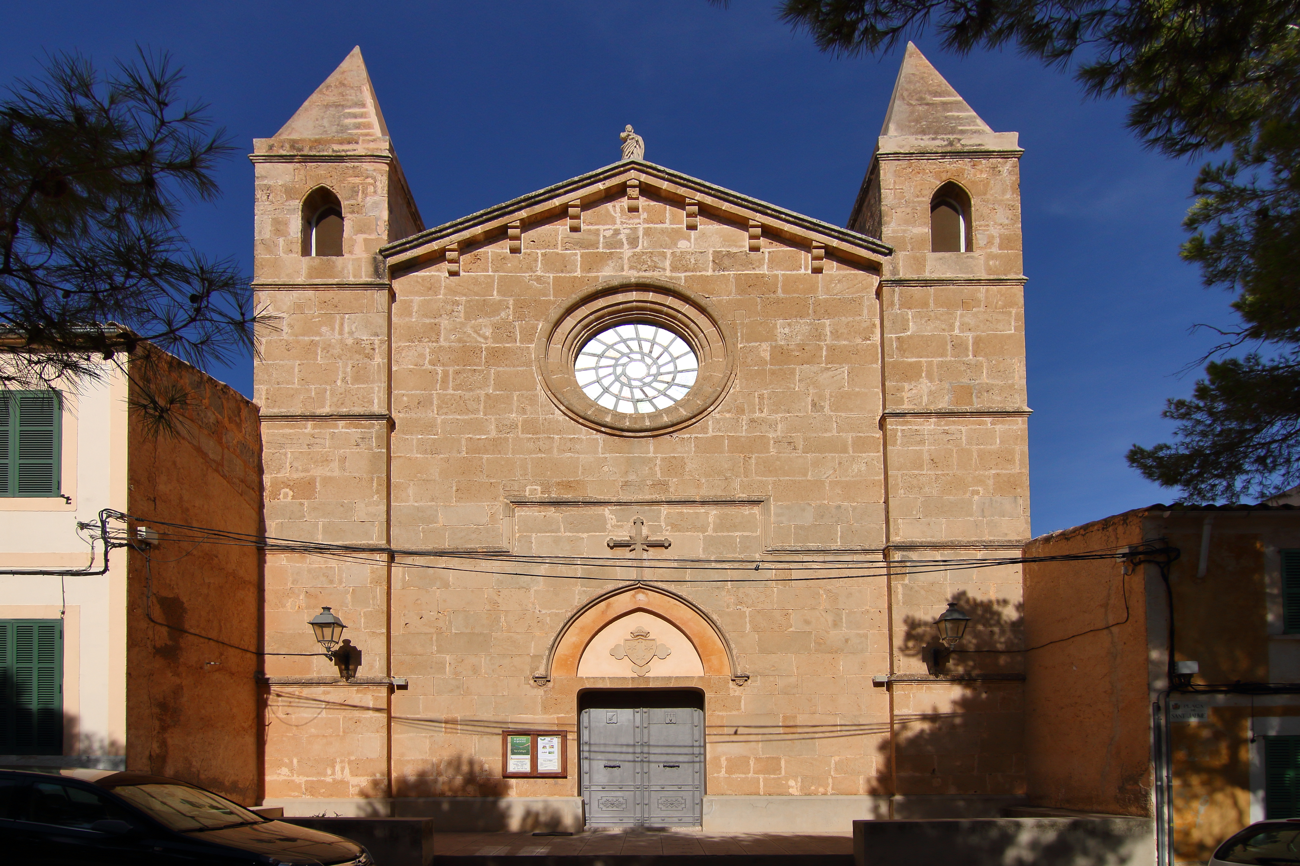 Portocolom, Eglesia de Mare de Déu del Carme